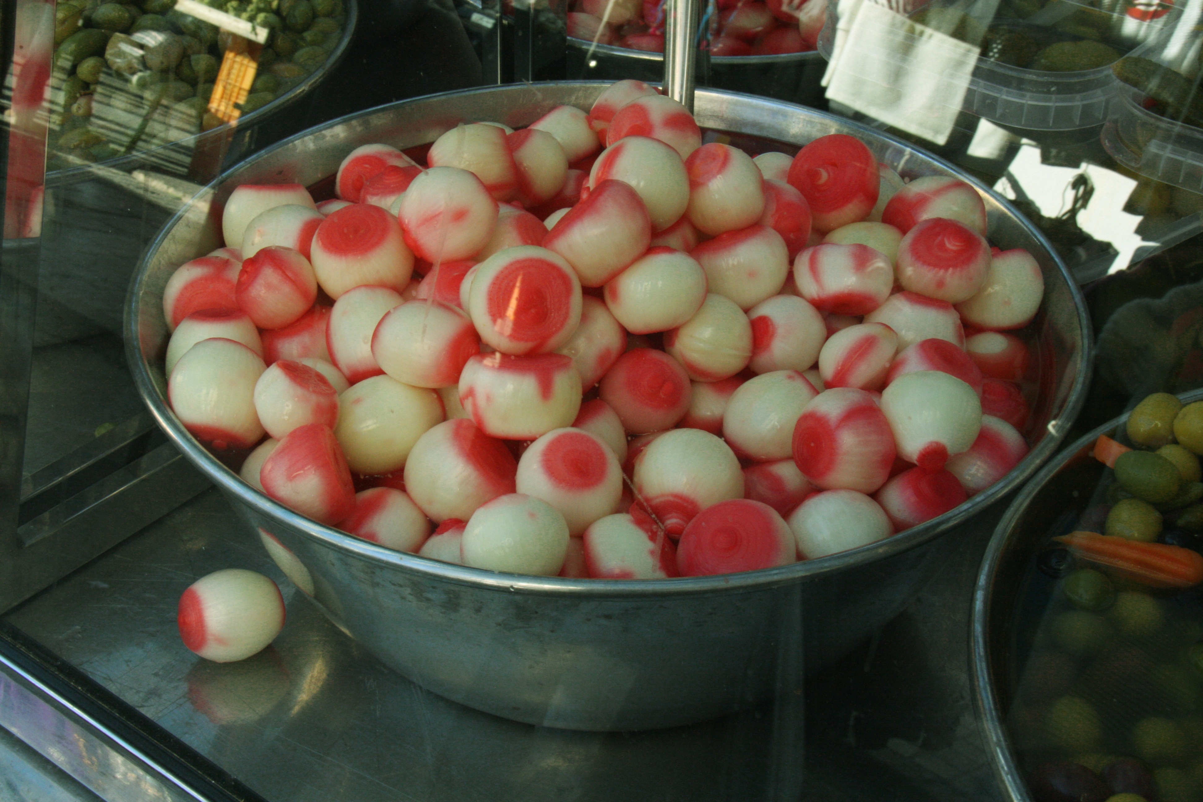 Eingelegte Zwiebeln